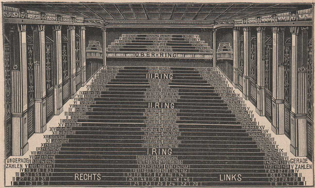 Rudolph Hertzog, Agenda 1912. Jahreskalender des Berliner Kaufhauses. Seite 104. Charlottenburger Schiller-Theater, Bismarckstraße 110. Leinen, 224 Seiten, 19,5 x 28,5 cm